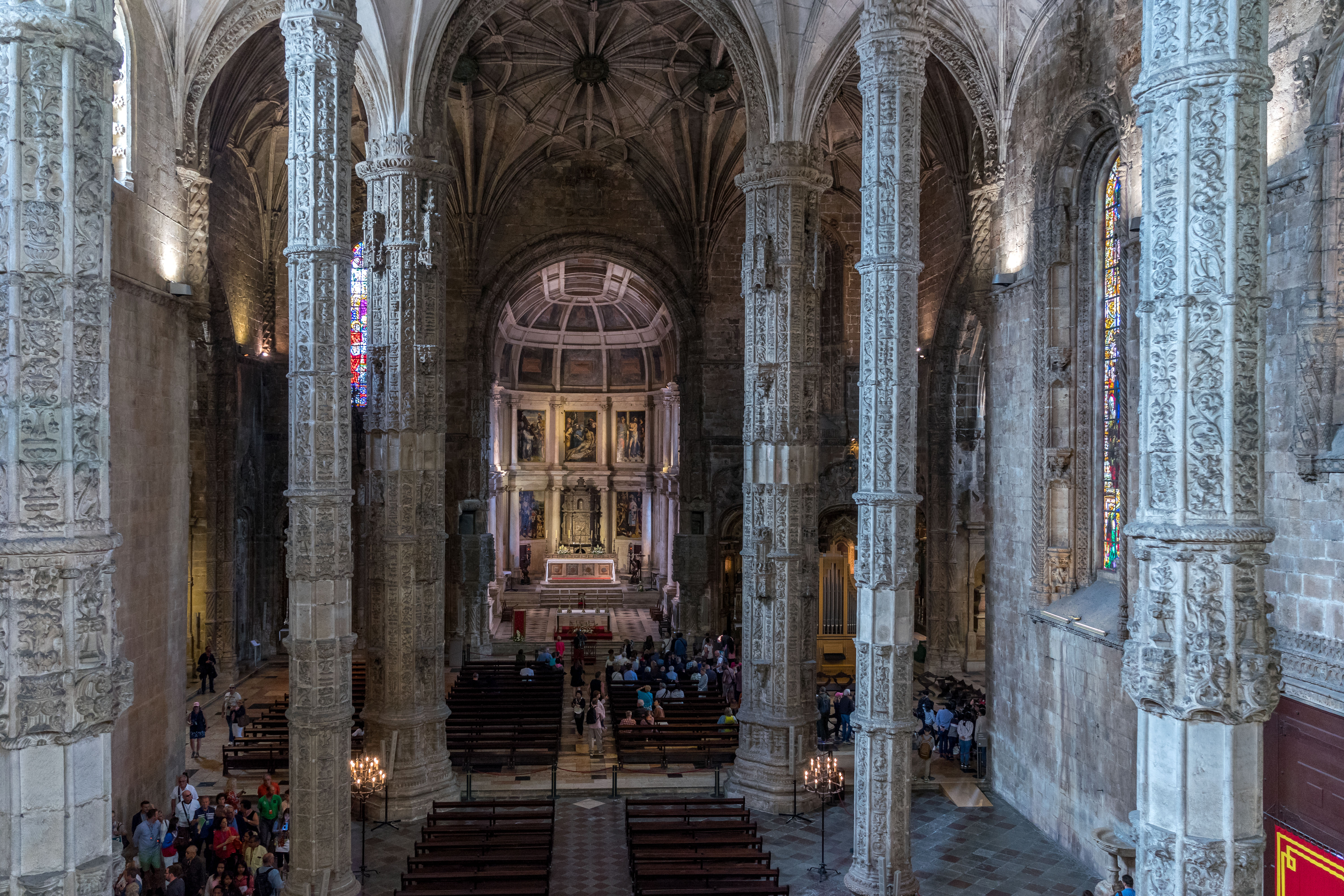 Lisbonne - Hiérominites - Eglise - Nef.